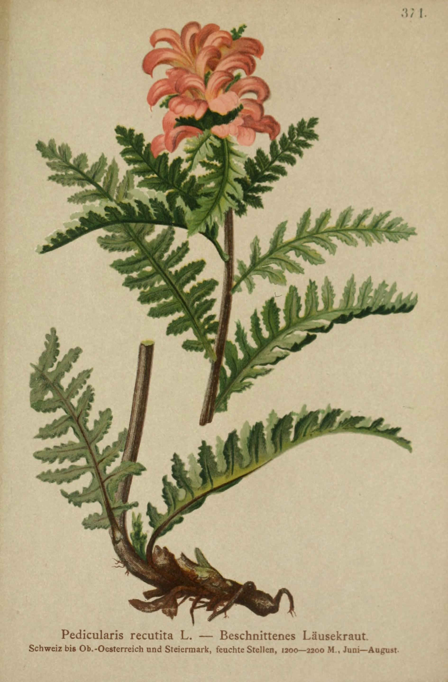 .'W I. Pedicularis recutita L. — Beschnittenes Läusekraut. Schweiz bis Ob.-Oesterreich nnd Steiermark, feuchte Stellen, 1200—2200 M., Juni— August